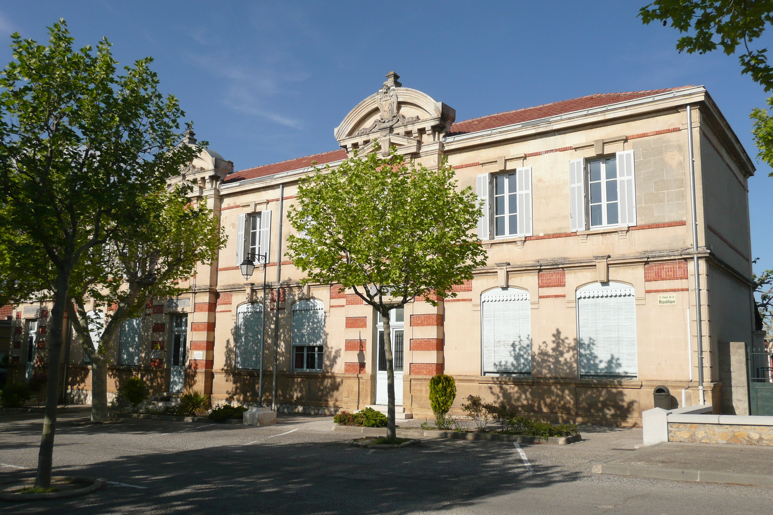 Ecole à Charleval (Bouches-du-Rhône).